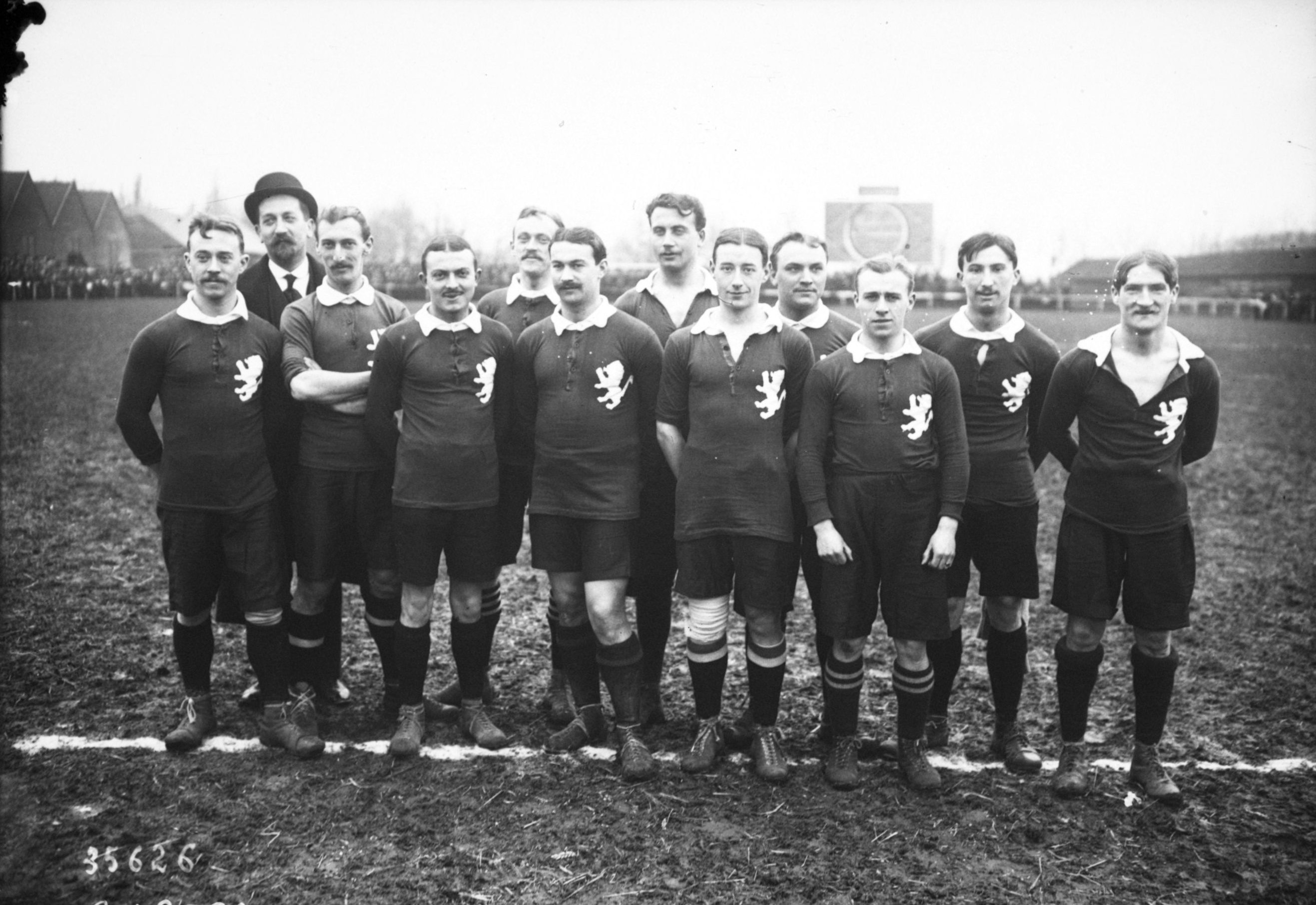 Sélection de l'équipe des Lions des Flandres de football, 4 janvier 1914 à Lille. Avec en particulier Albert Eloy, Charles Dujardin, Henri Moigneu, Gabriel Hanot, Émile Dusart, Jean Degouve, Maurice Gravelines, Henri Lesur (3e en bas en partant de la gauche), Paul Chandelier (3e en bas en partant de la droite, avec un bandage), Raymond Dubly (2e en bas à partir de la droite), Alphonse Six (derrière au centre), Albert Parsys (avant-dernier à droite), Jean Ducret (dernier à droite). Voir aussi Conditions d'utilisations des clichés de